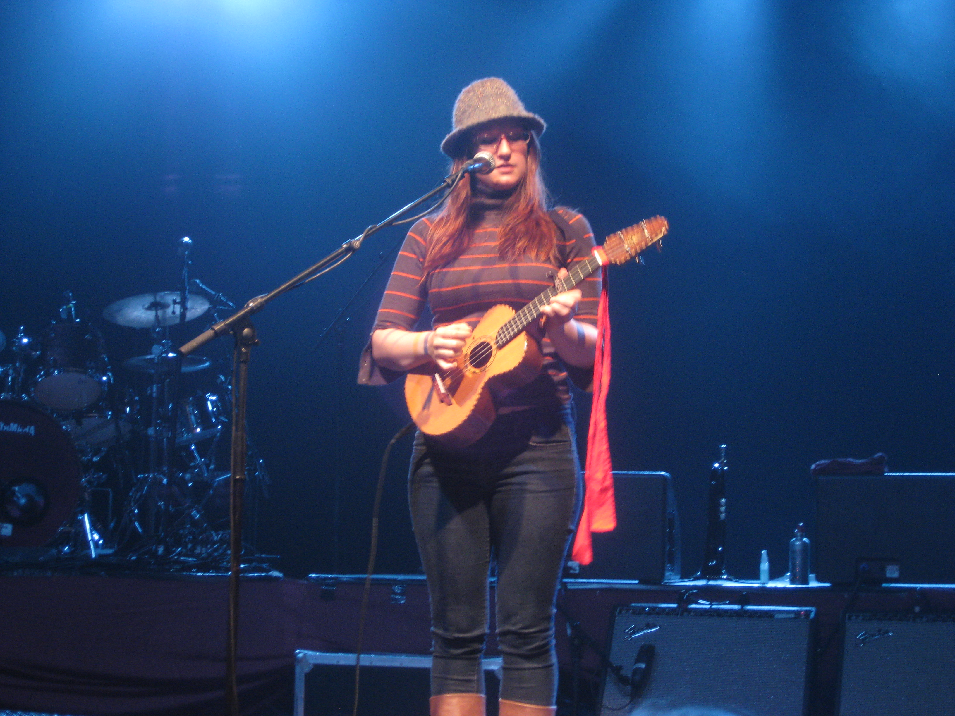 Ingrid Michaelson performing at Fryshuset, Stockholm.